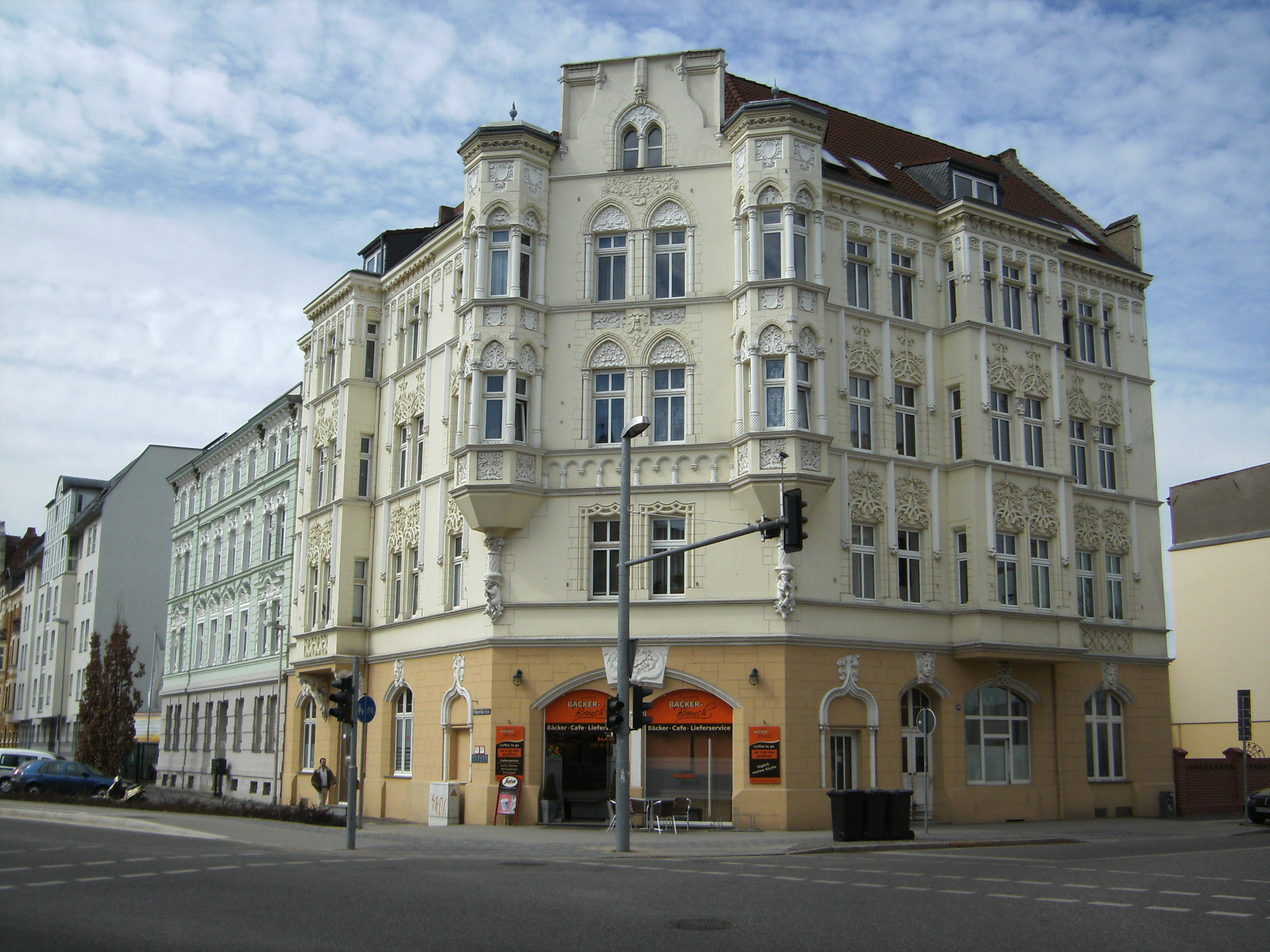 Schillerstraße 33